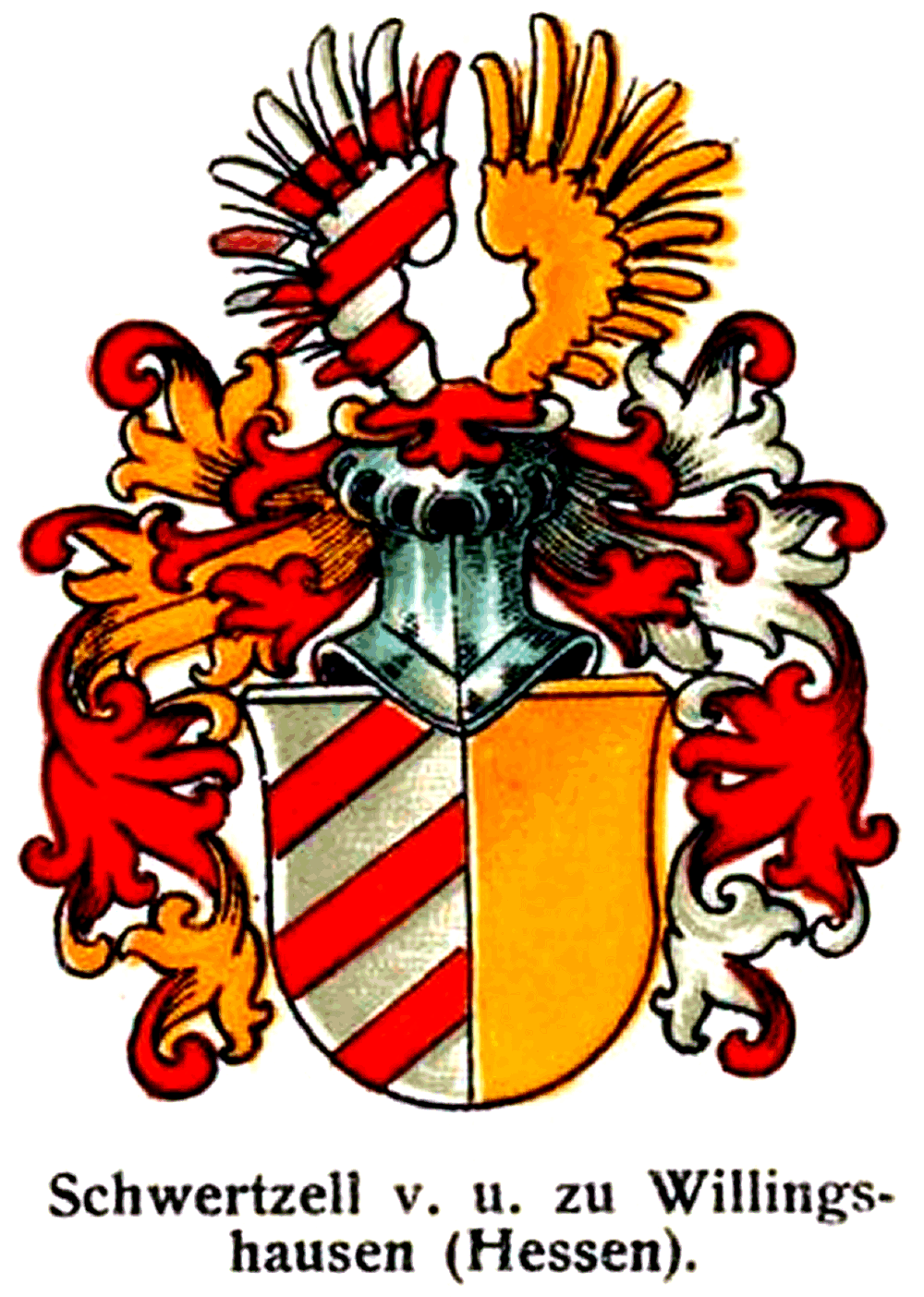 Wappen derer von Schwertzell